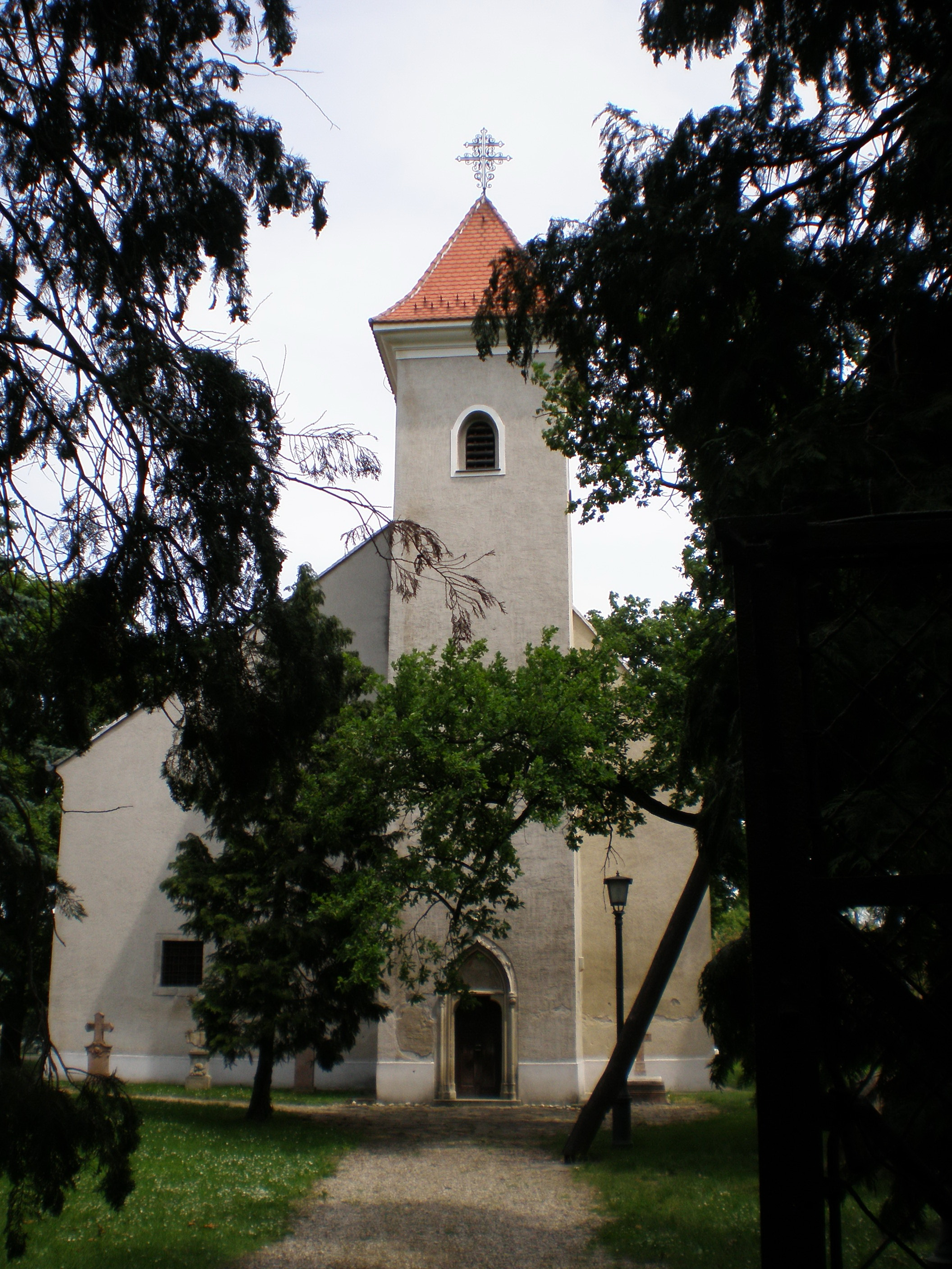 Boldogasszony kápolna (Hédervár, Győr-Moson-Sopron megye, Magyarország)